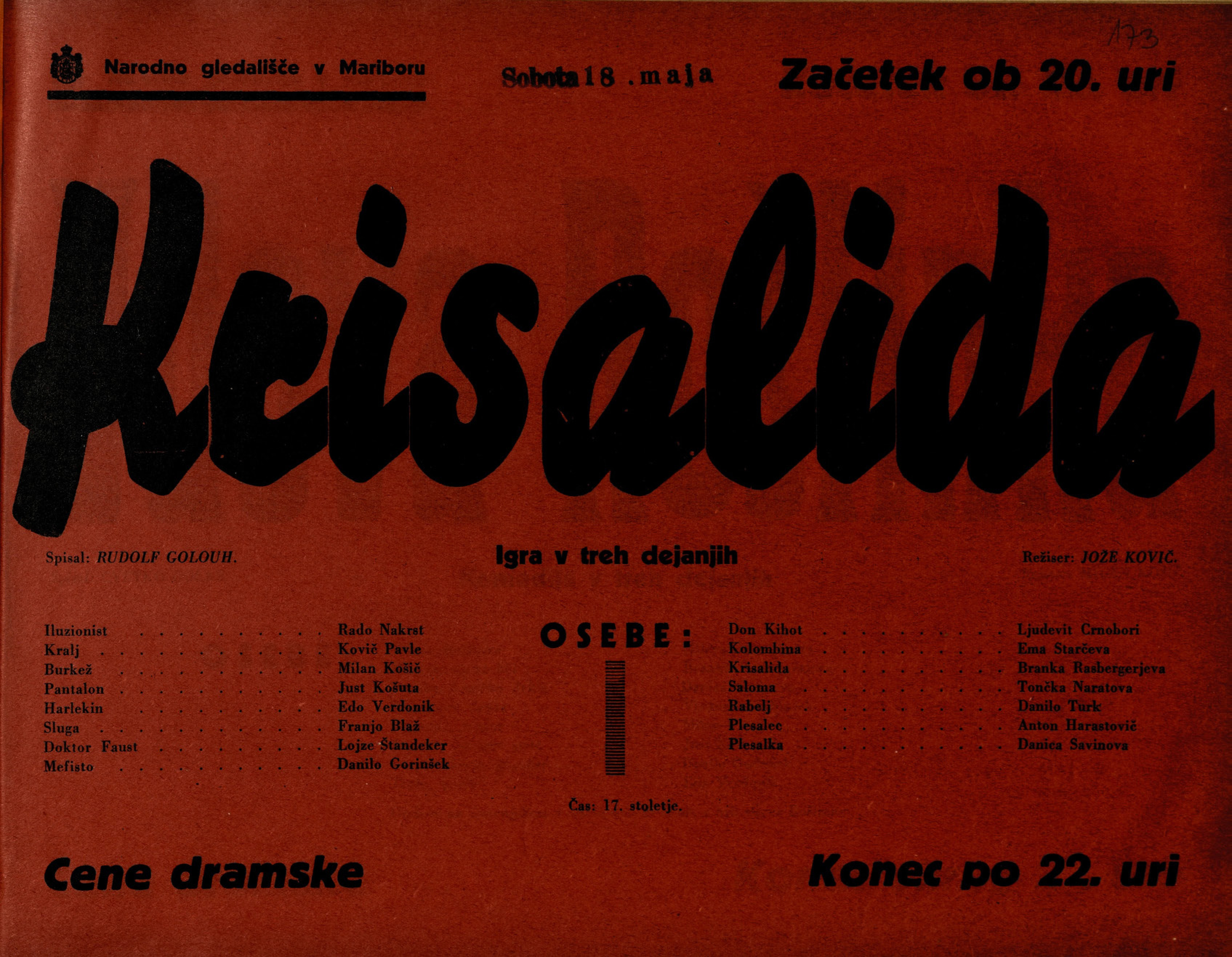 Plakat za predstavo Krisalida v Narodnem gledališču v Mariboru.